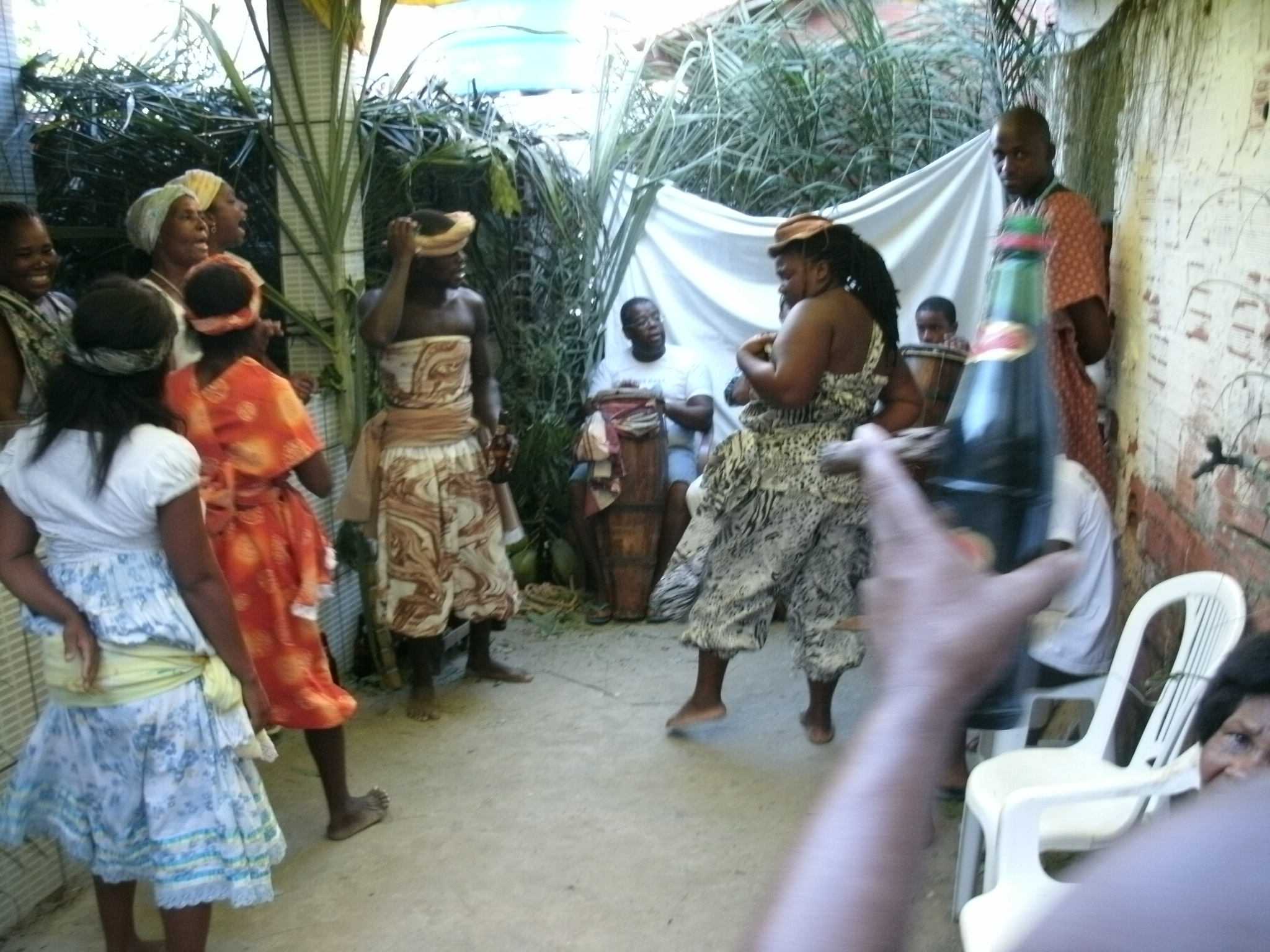 Cérémonie de candomblé sur l'île d'Itaparica